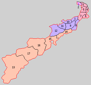 三重県多気郡の町村制時点の町村。